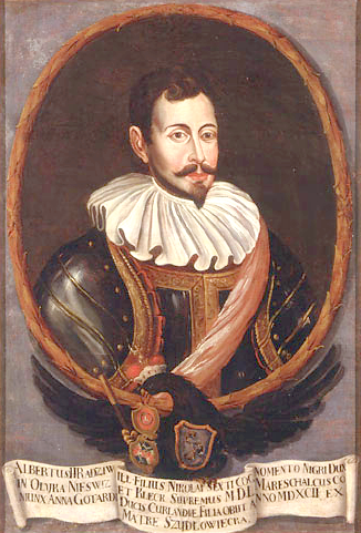 Albrecht Radziwiłł